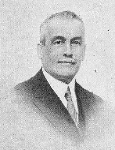 Plácido Castro Rivas, fotografía en Vida Gallega 1927